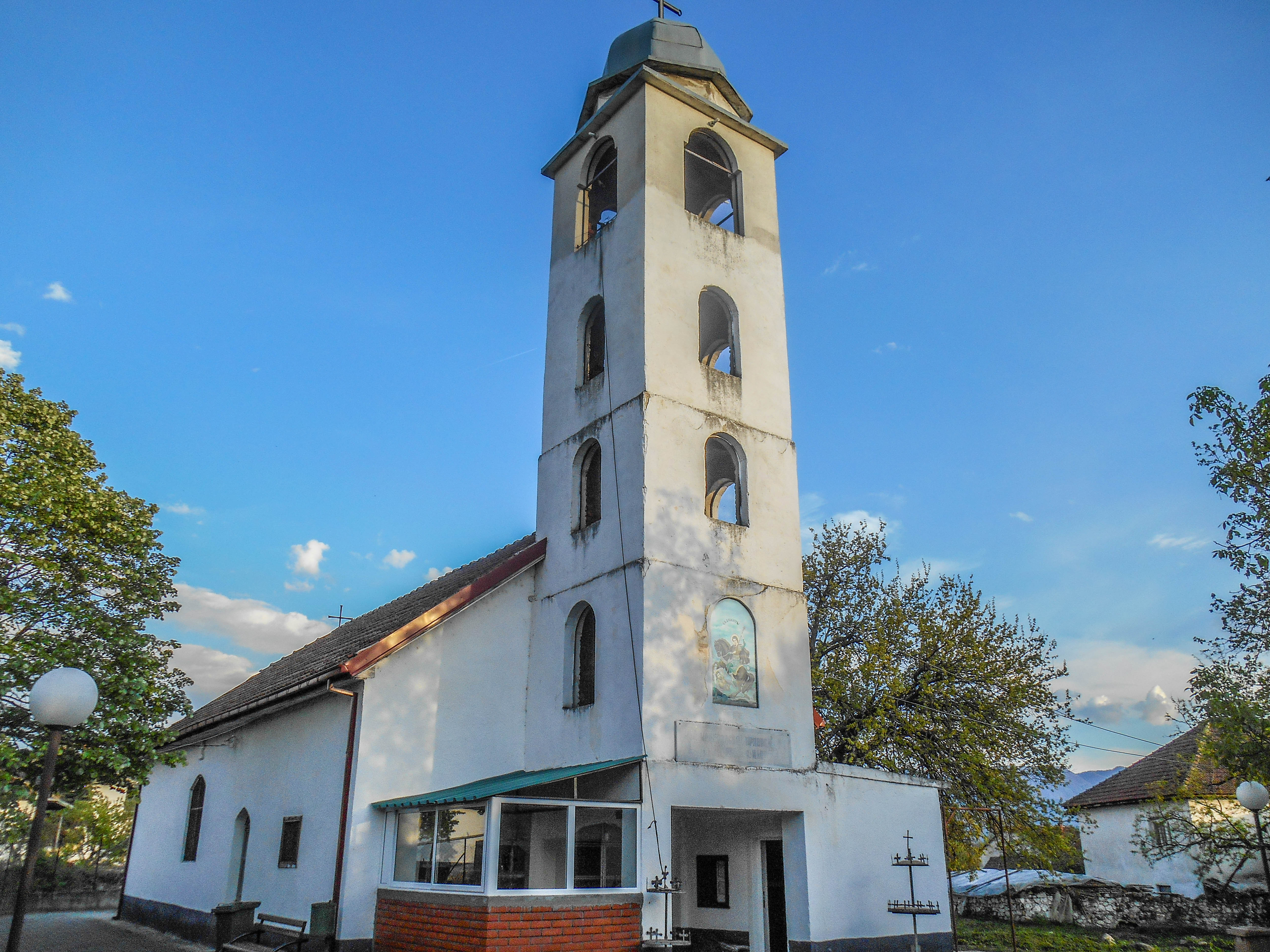 Црква „Св. Димитриј“ - Иловица